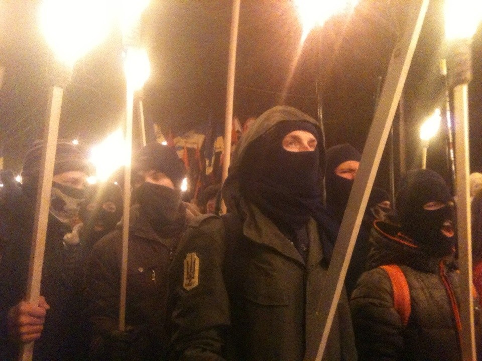 МГО Моноліт на смолоскипному марші